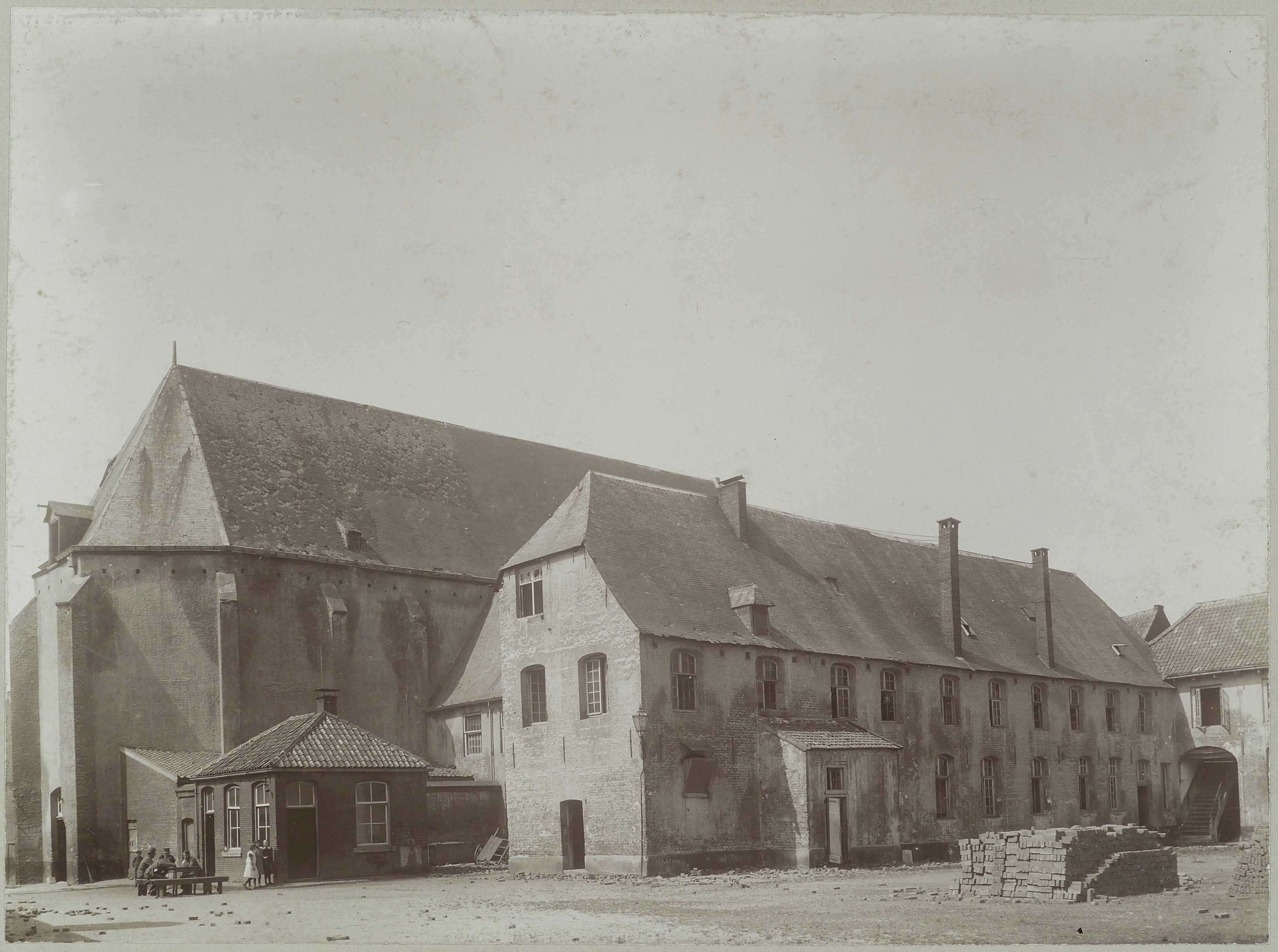 Minderbroederklooster: Kerk en vleugel voormalig klooster gezien vanuit het noordoosten (opmerking: Zie ook neg 4.589)